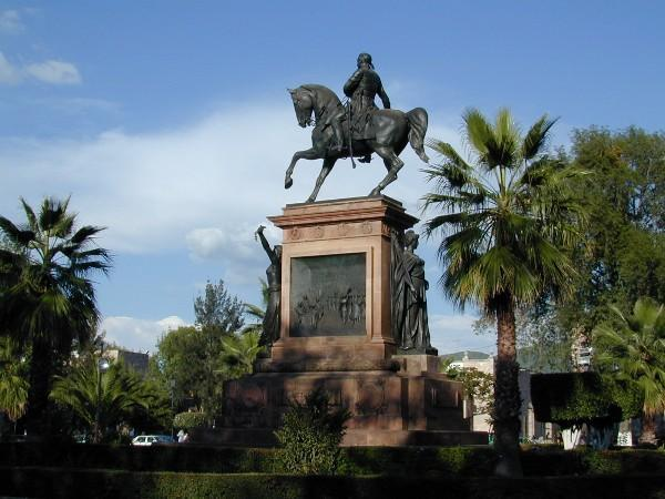 "El Caballito"